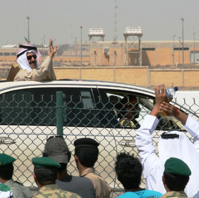 الشيخ صباح الأحمد الجابر الصباح في العرض العسكري